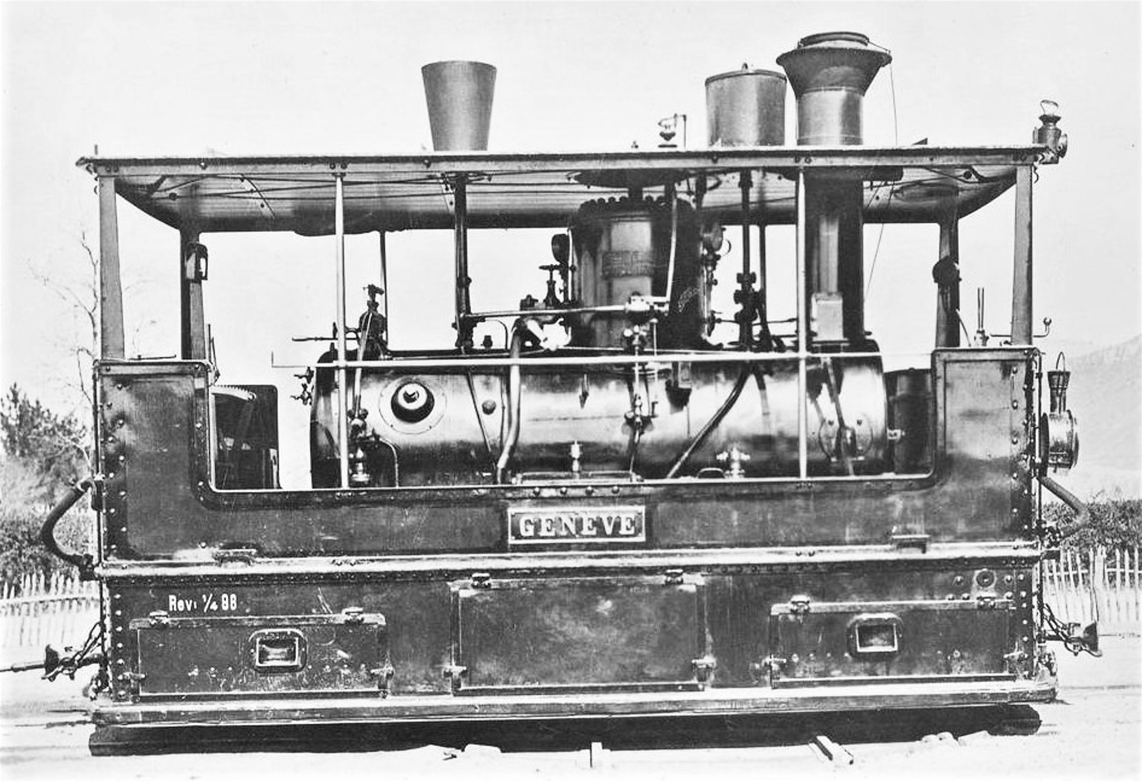 Locomotive vapeur GENÈVE de la Société du Chemin de fer Genève-Veyrier (GV)